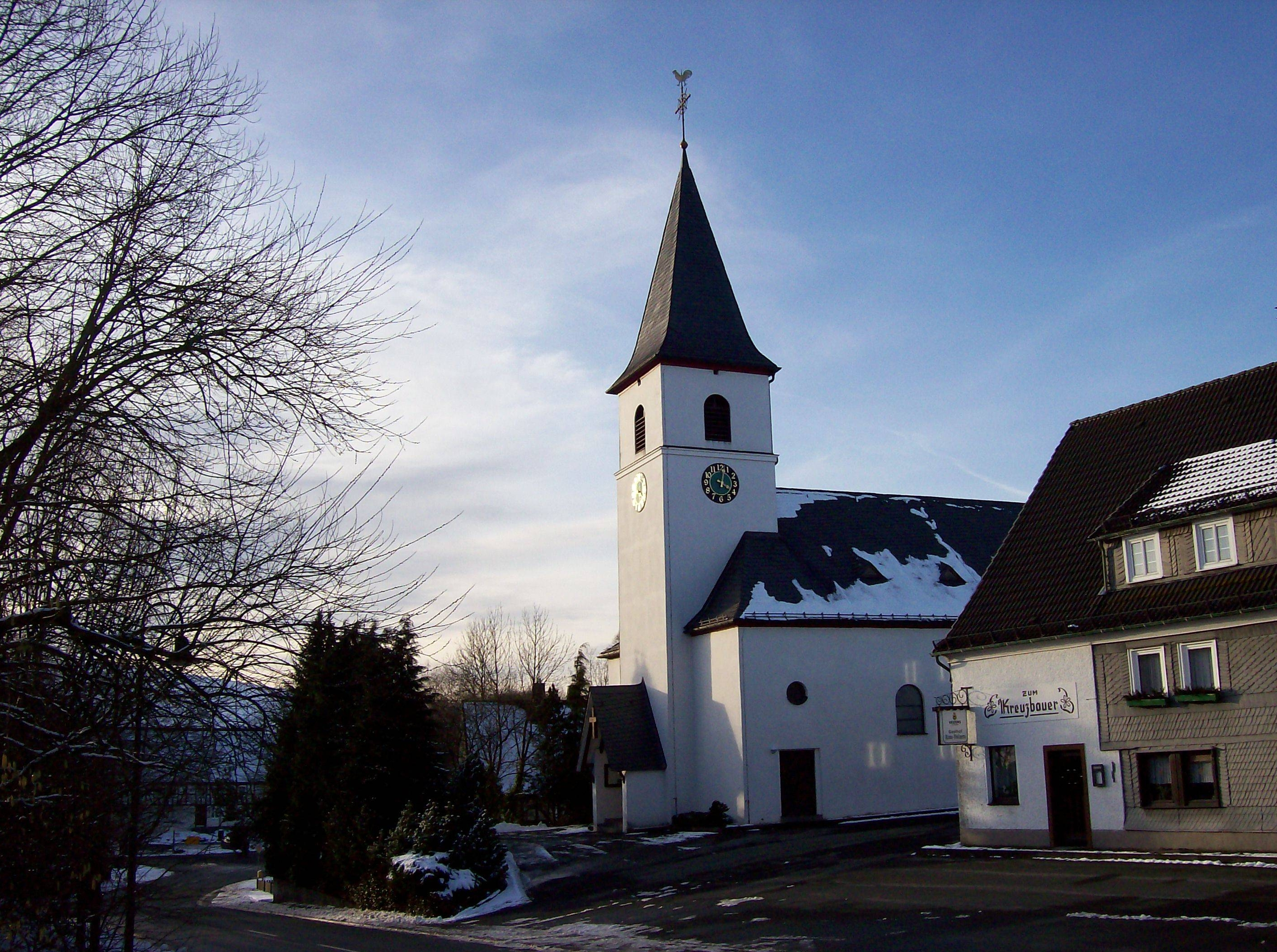 Kirche in Niederlandenbeck, Gemeinde Eslohe (Germany)